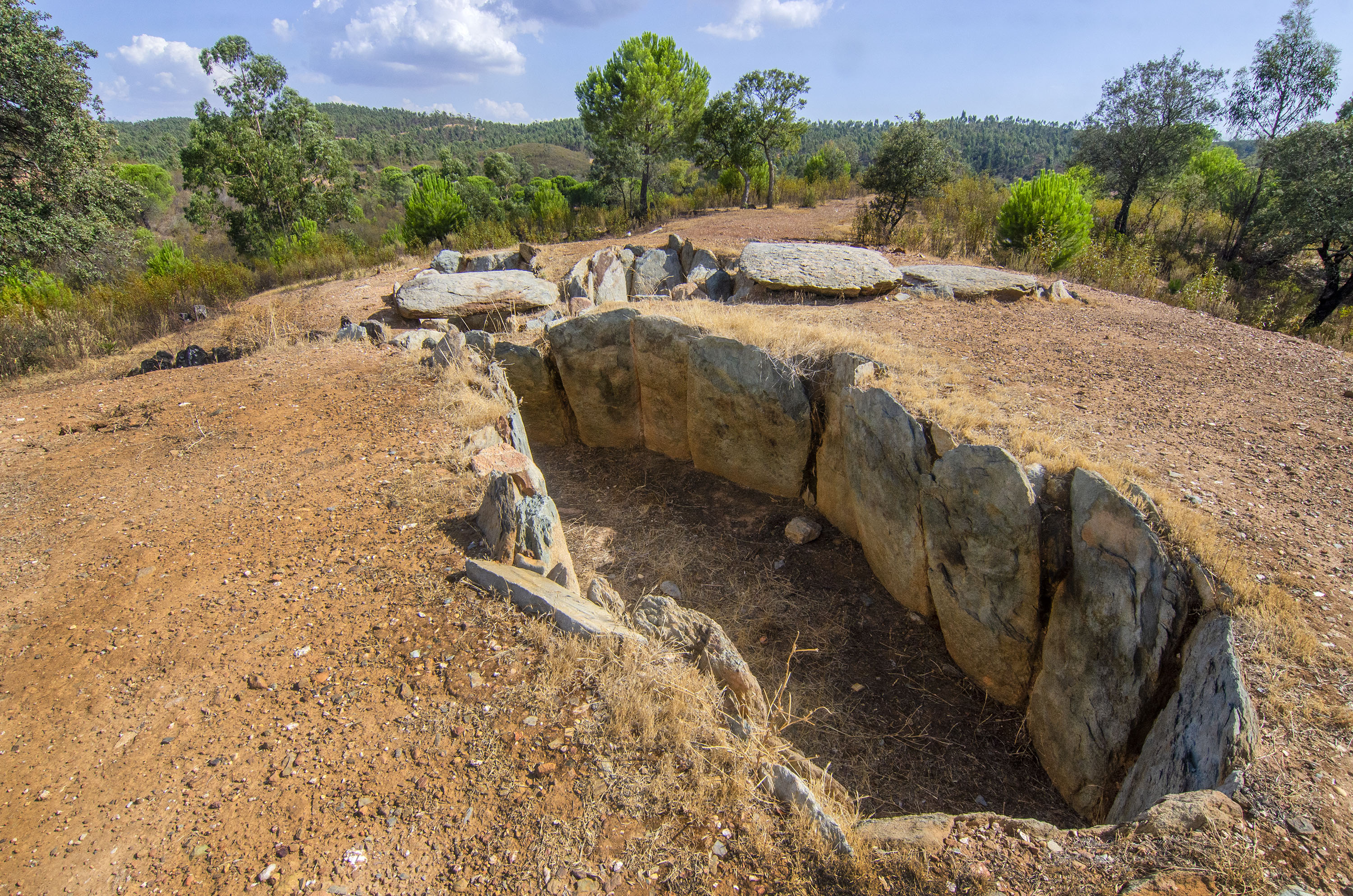 El Pozuelo, Zalamea la Real, Huelva.